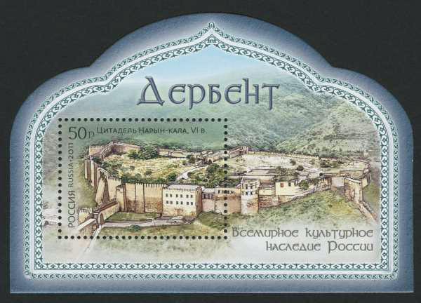 № 1518. Всемирное культурное наследие России. Старый город и крепостные сооружения Дербента